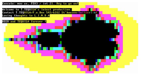 Tequilavirus